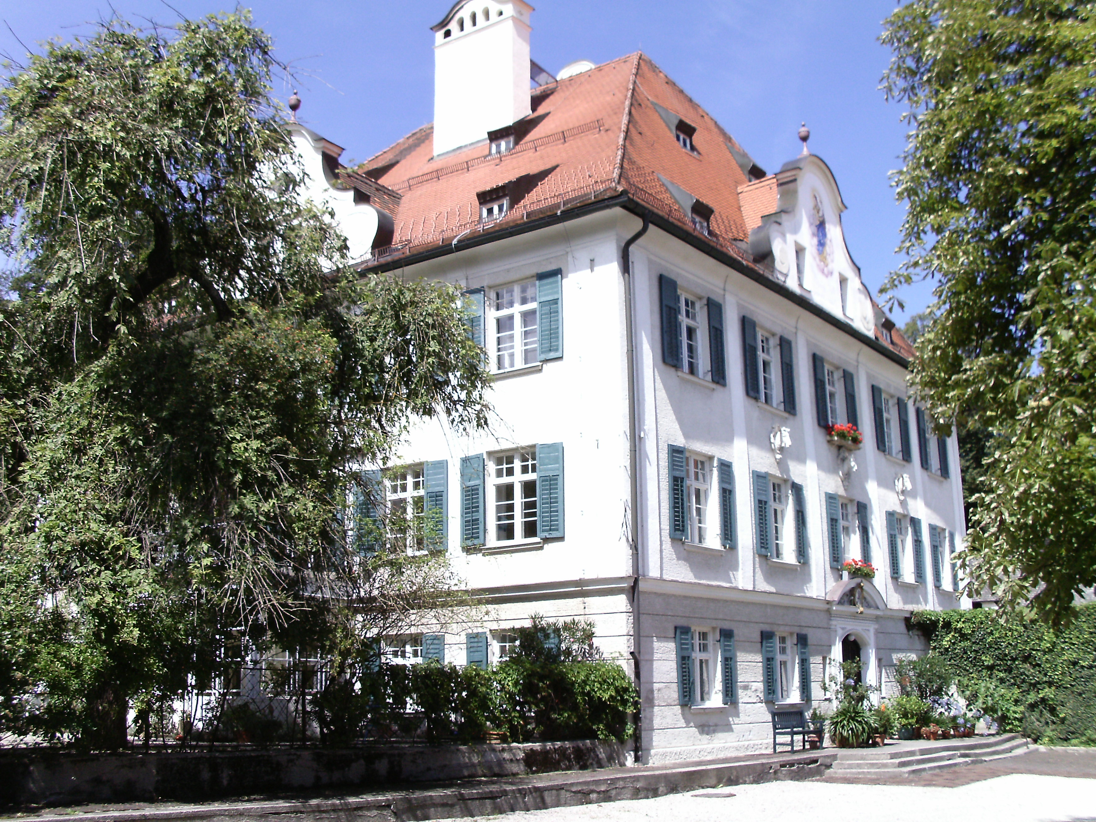 Altes Pfarrheim Haslach